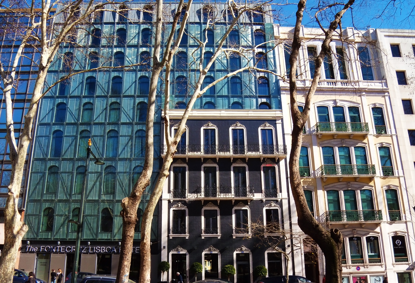 Дома на Проспекте Свободы